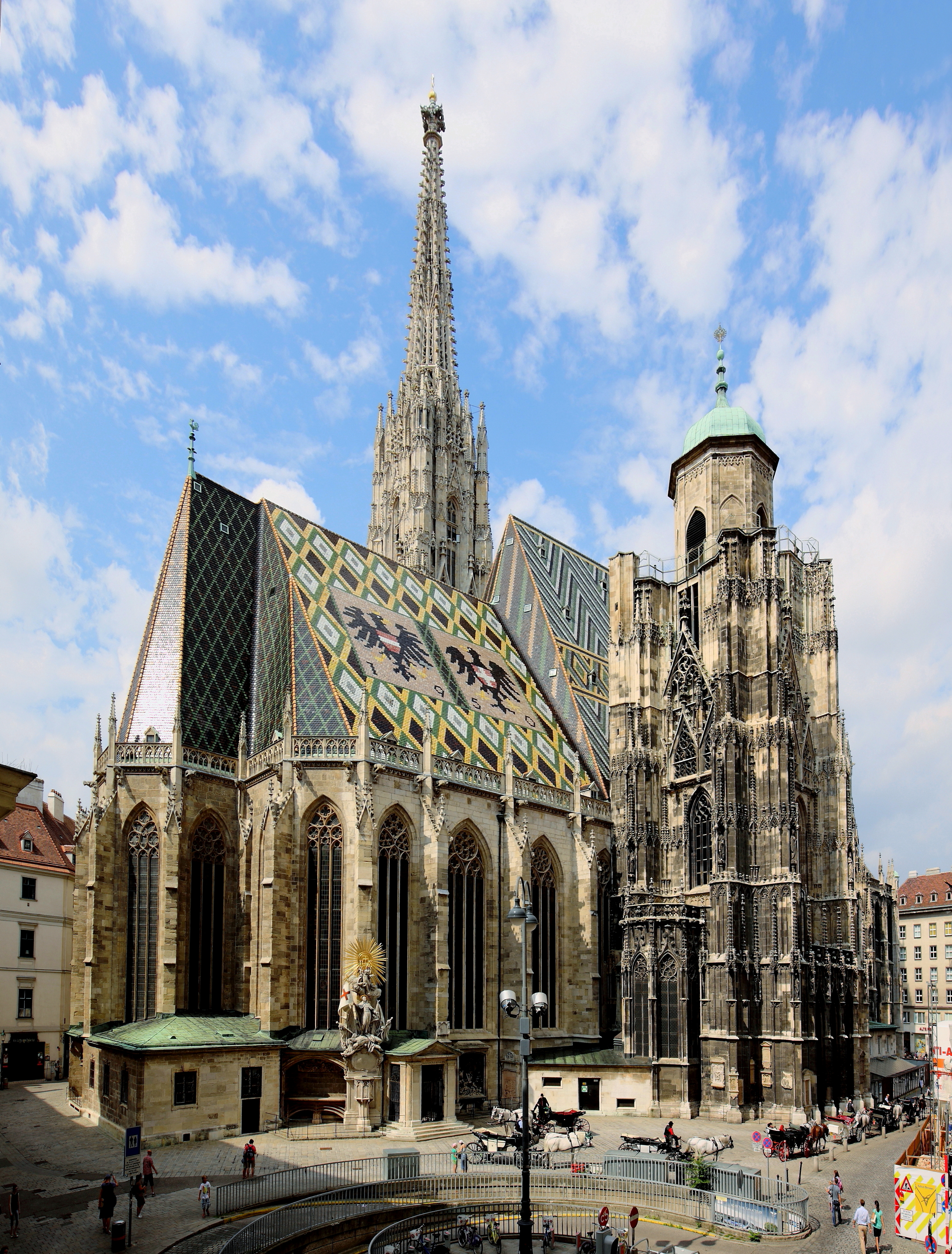 Nordostansicht des Stephansdomes in der österreichischen Bundeshauptstadt Wien.Im Vordergrund der Albertinische Chor (errichtet in der 1. Hälfte des 14. Jahrhunderts) und der nie fertiggestellte Nordturm mit der Glockenstube für die Pummerin. Diese war ursprünglich im Südturm aufgehängt. Nachdem sie beim Brand im Zuge des II. WK 1945 abstürzte, wurde eine neue gegossen und 1952 auf einem provisorischen Glockenstuhl im Bauhof der Dombauhütte aufgehängt. 1957 erfolgte der Umzug in den Nordturm.